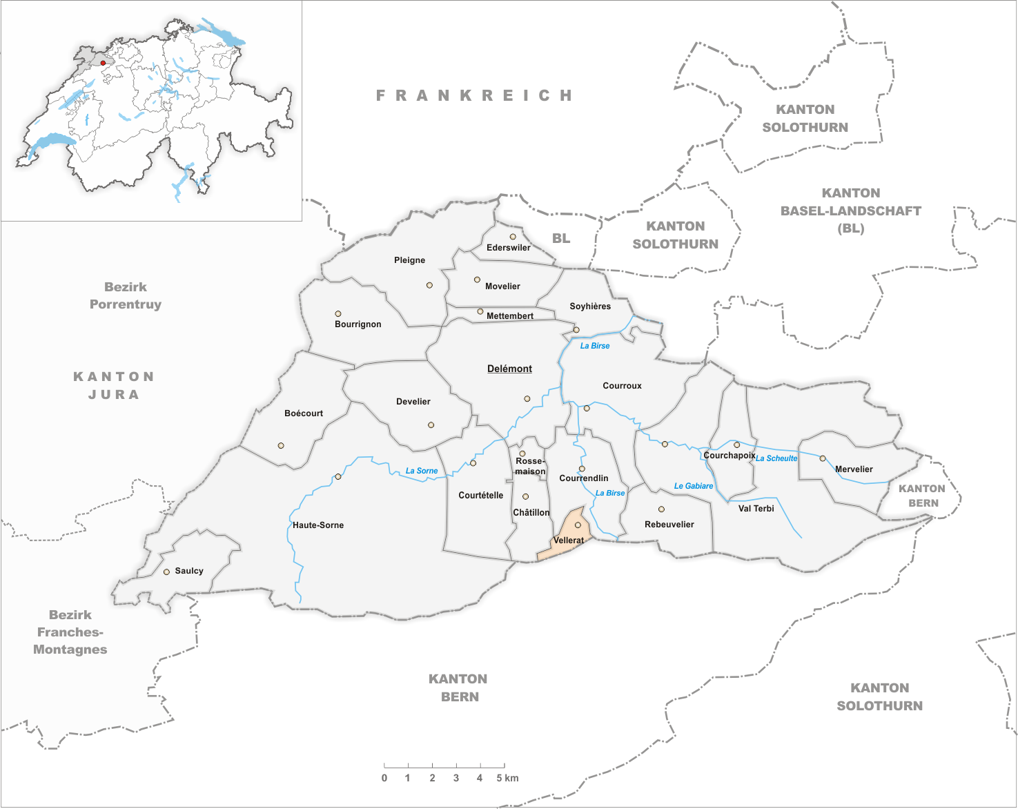 Municipality Vellerat